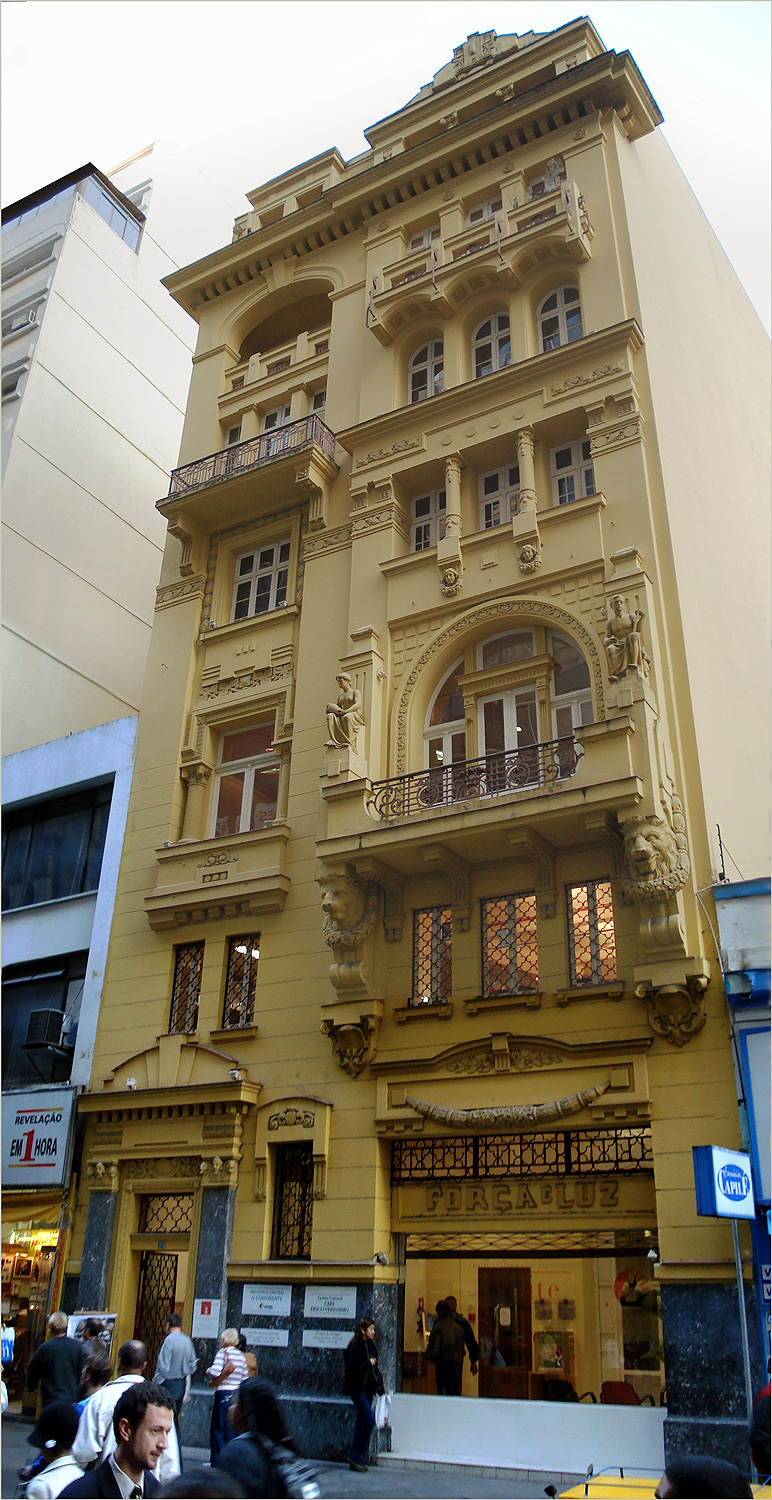 Prédio do Centro Cultural CEEE Erico Veríssimo, Porto Alegre, Brasil.